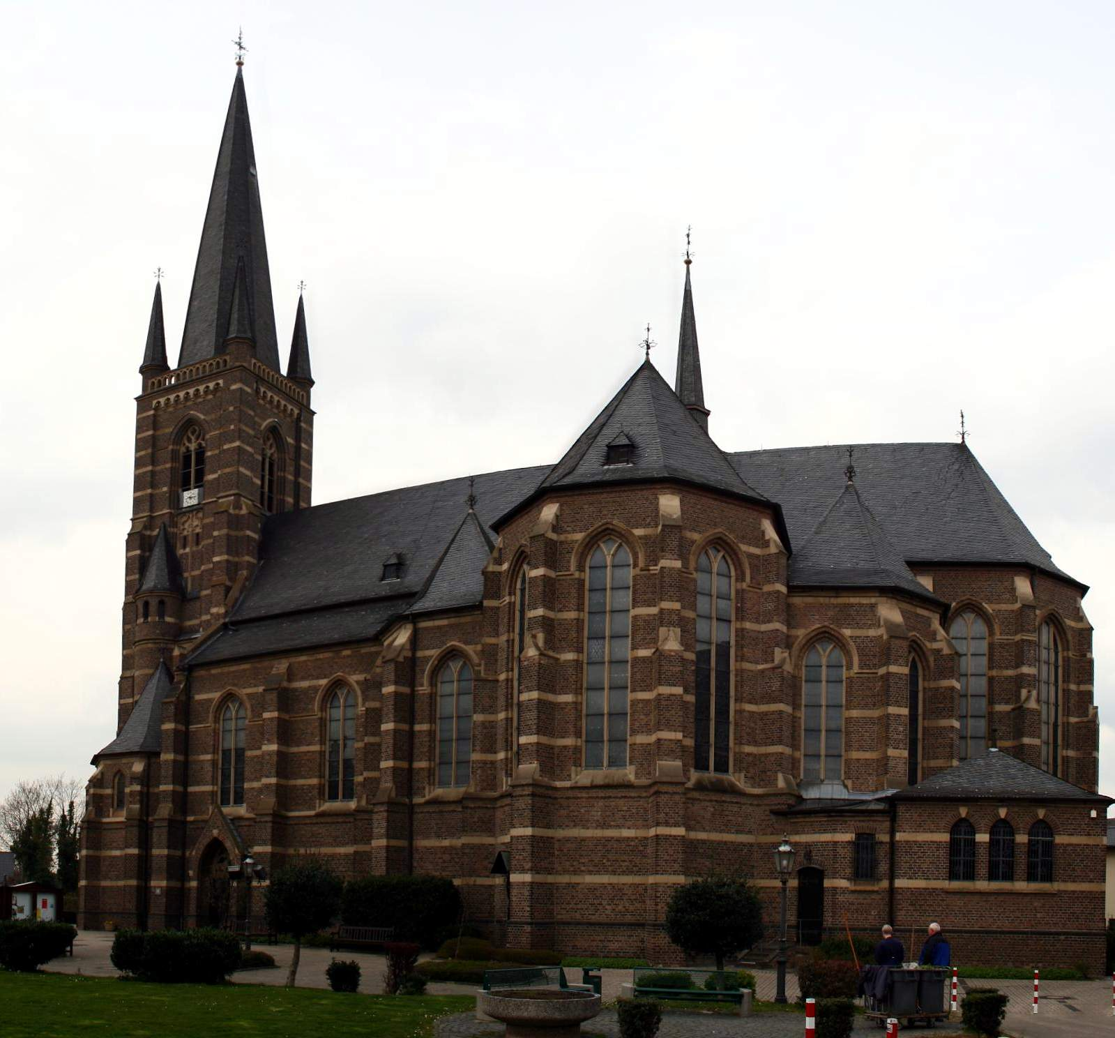 Kirche in Bedburg